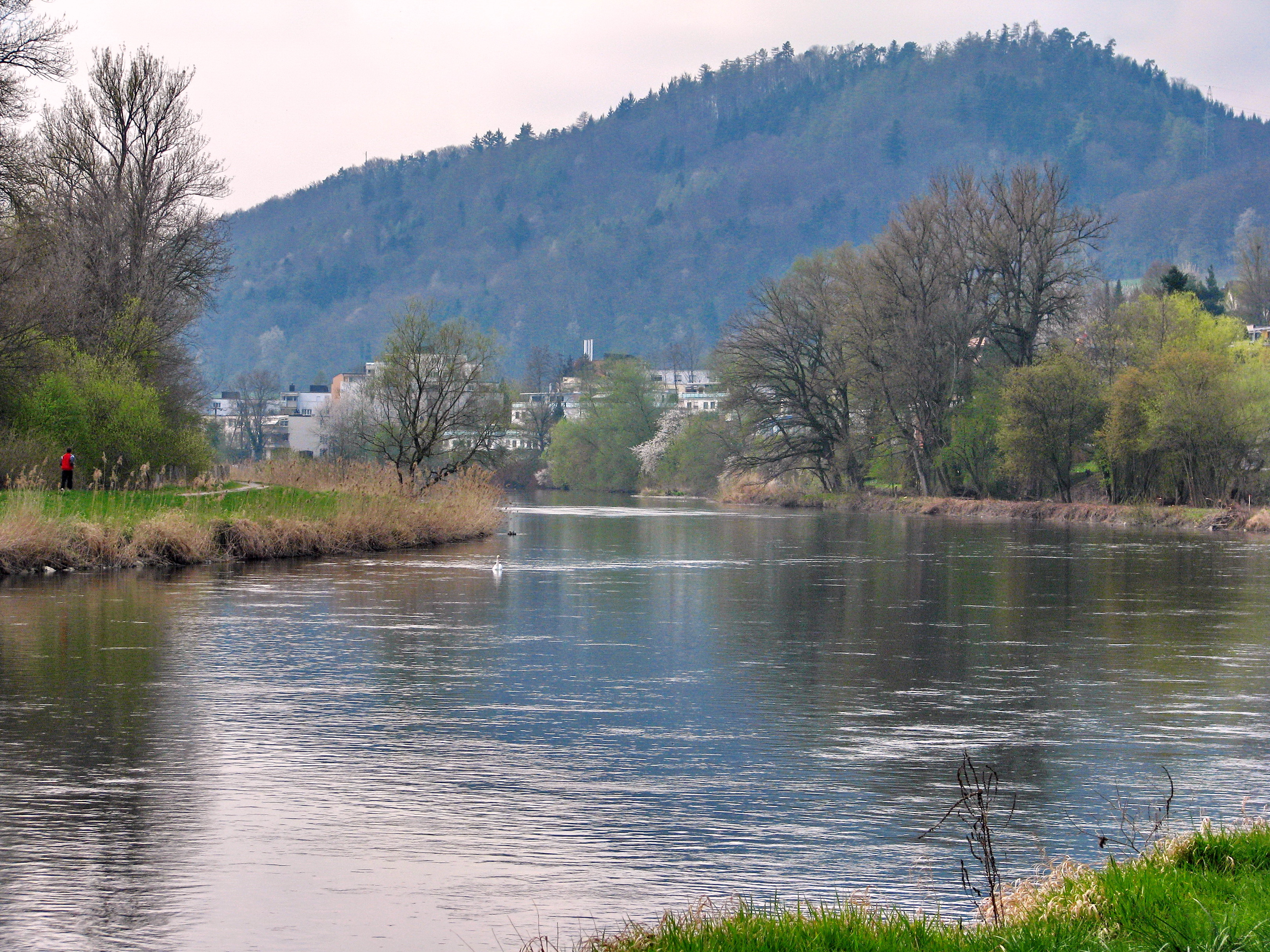 Limmat in Geroldswil